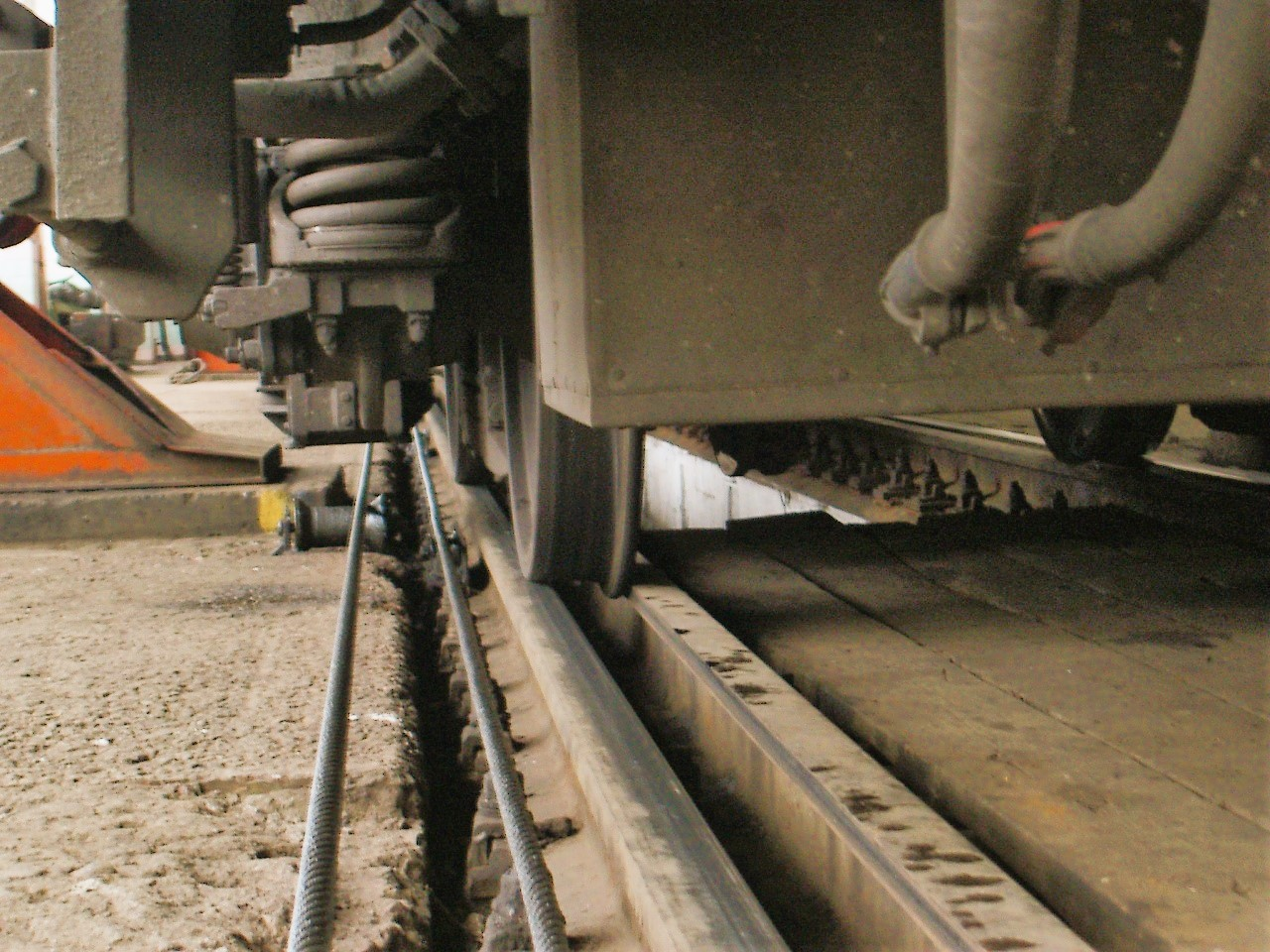 Spillanlage und Führungsschiene in der Umspuranlage Brest, BY. Klassische Vierschienengleise sind beim geringen Unterschied zwischen Regel- und russischer Breitspur von nur 85mm nicht möglich. Die Führungsschienen führen Regelspurradsätze deswegen an den Rückflächen.